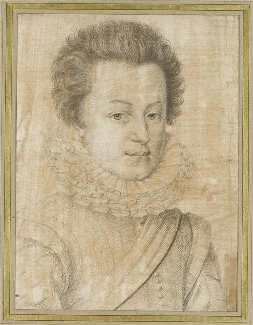 Presumed Portrait of Caesar, Duke of Vendôme .~ Daniel Dumonstier